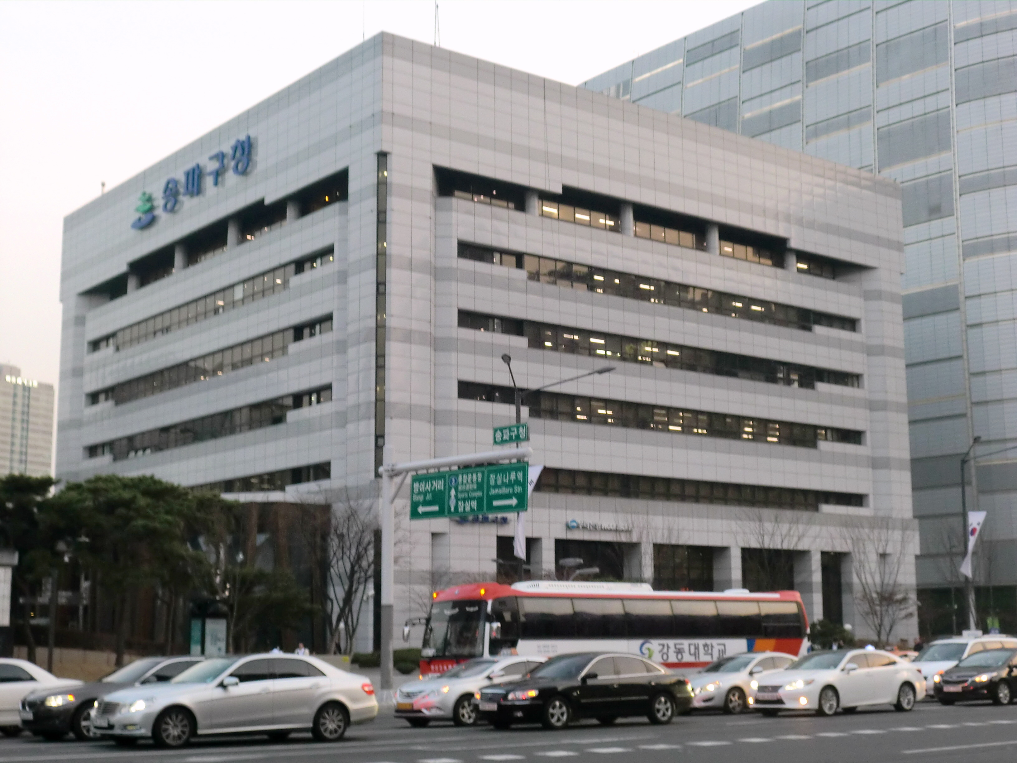 서울특별시 송파구에 있는 송파구청